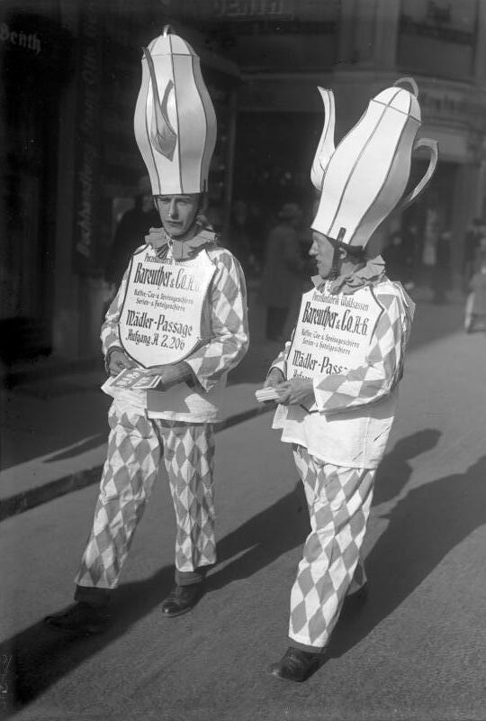 Die Eröffnung der Leipziger Frühjahrsmesse ! Trotz schwerer wirtschaftlicher Depression begann die Leipziger Frühjahrsmesse mit einem guten Auftakt für Käufer und Verkäufer aus allen Herren Länder. Lebende Reklamefiguren für deutsches Porzellan in den Strassen Leipzigs.